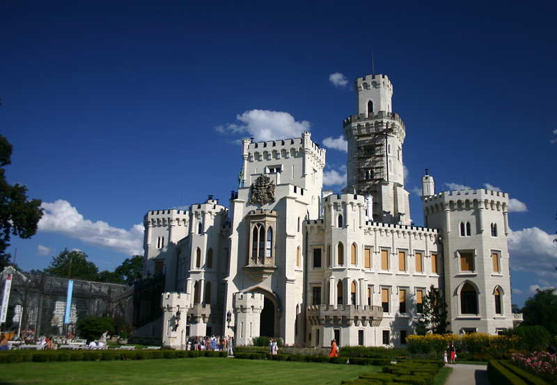 Hluboká